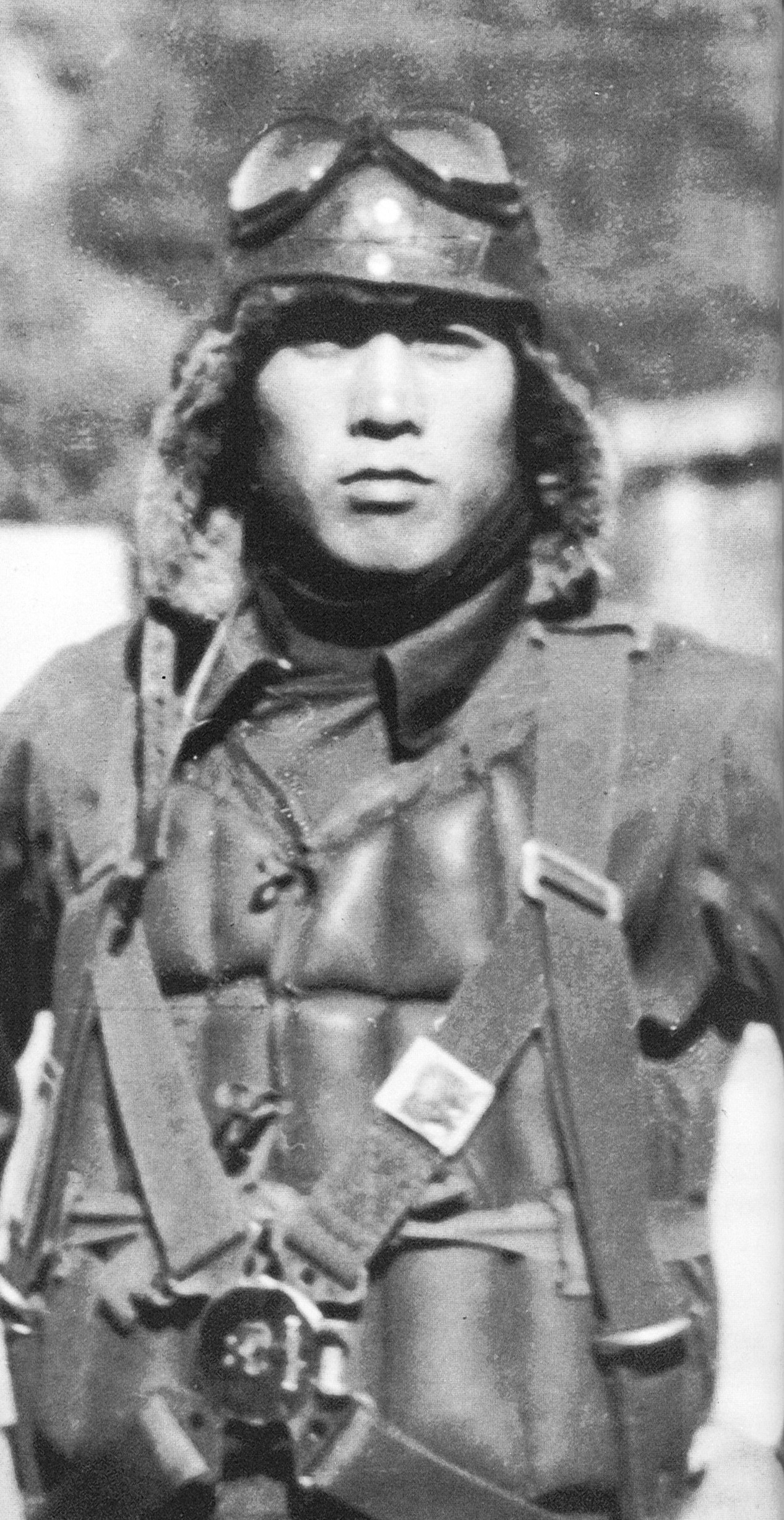 1941年、大分空での原田要